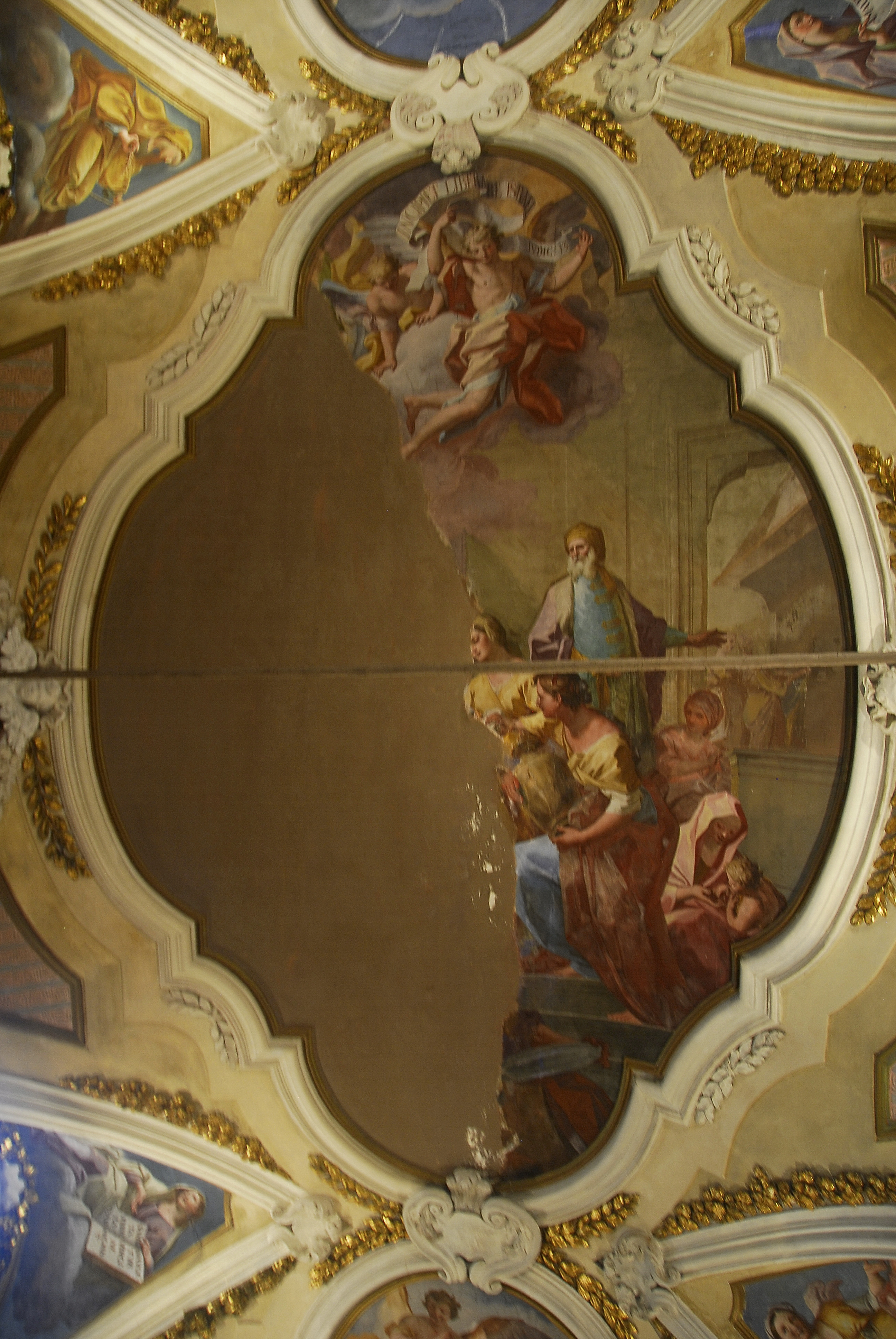 Chiesa di Santa Maria del Piliere - Santa Maria degli Angelini, Palermo, ITA, cripta